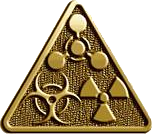 Емблема військ радіаційного, хімічного та бактеріологічного захисту